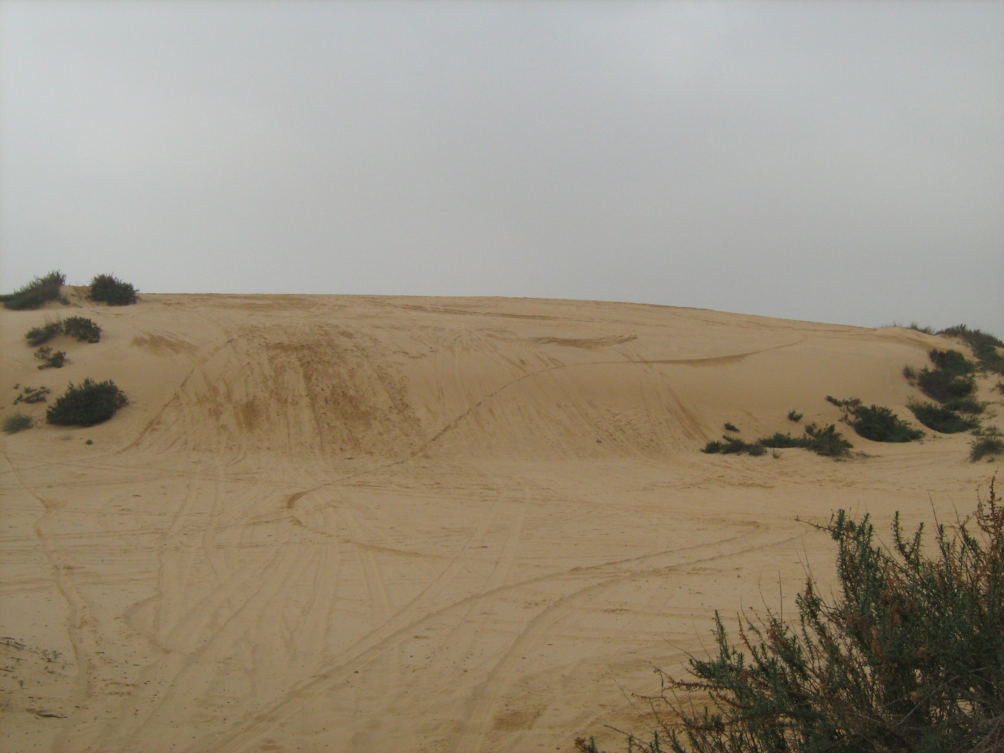 הדיונה הגדולה באשדוד